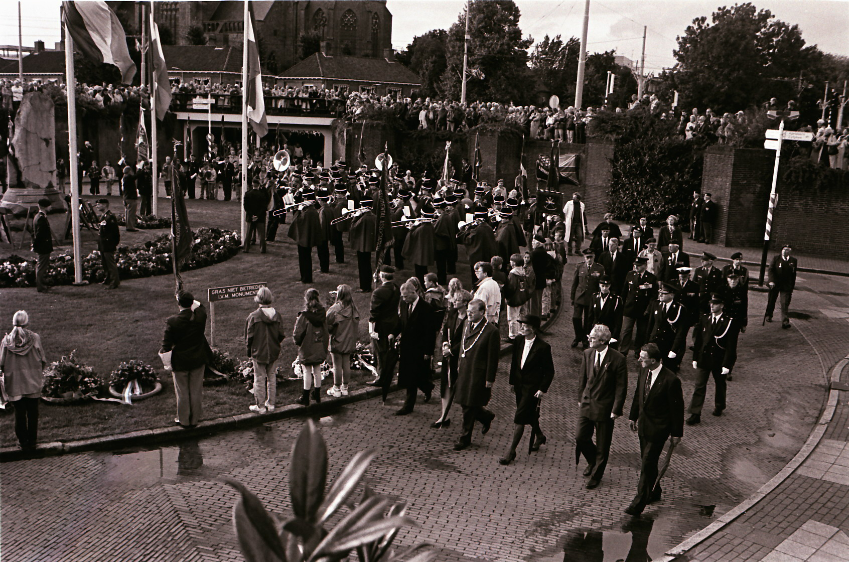 Airborne herdenking in de gemeente Arnhem. De herdenking bij het oorlogsmonument op het Airborneplein in Arnhem. Lopend voorste rij, 4e van rechts de Arnhemse burgemeester Scholten, en 2e van rechts de Edese burgemeester Blanken.